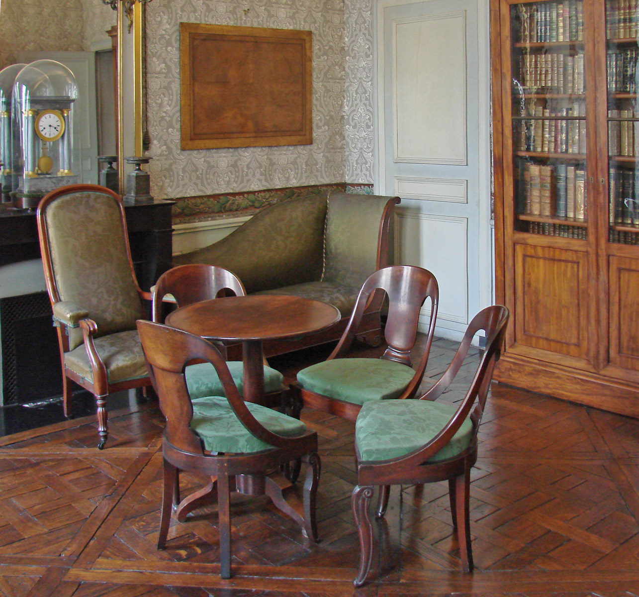 Le cabinet de travail de l'appartement d'Auguste Comte (philosophe, 1798- 1857), meublé entre autres de chaises gondoles, d'un fauteuil Voltaire et d'une méridienne, 10 rue Monsieur le Prince à Paris.